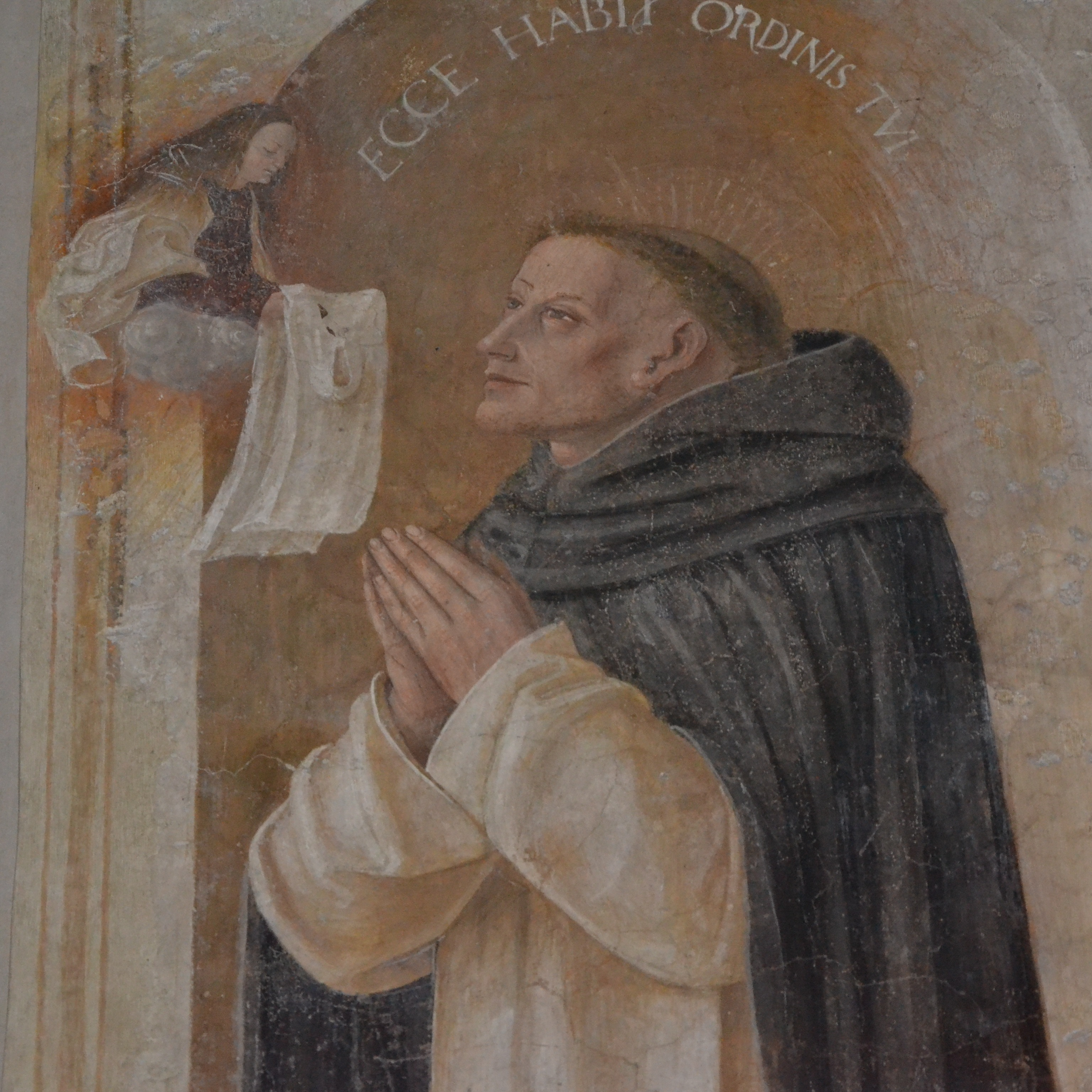 navata